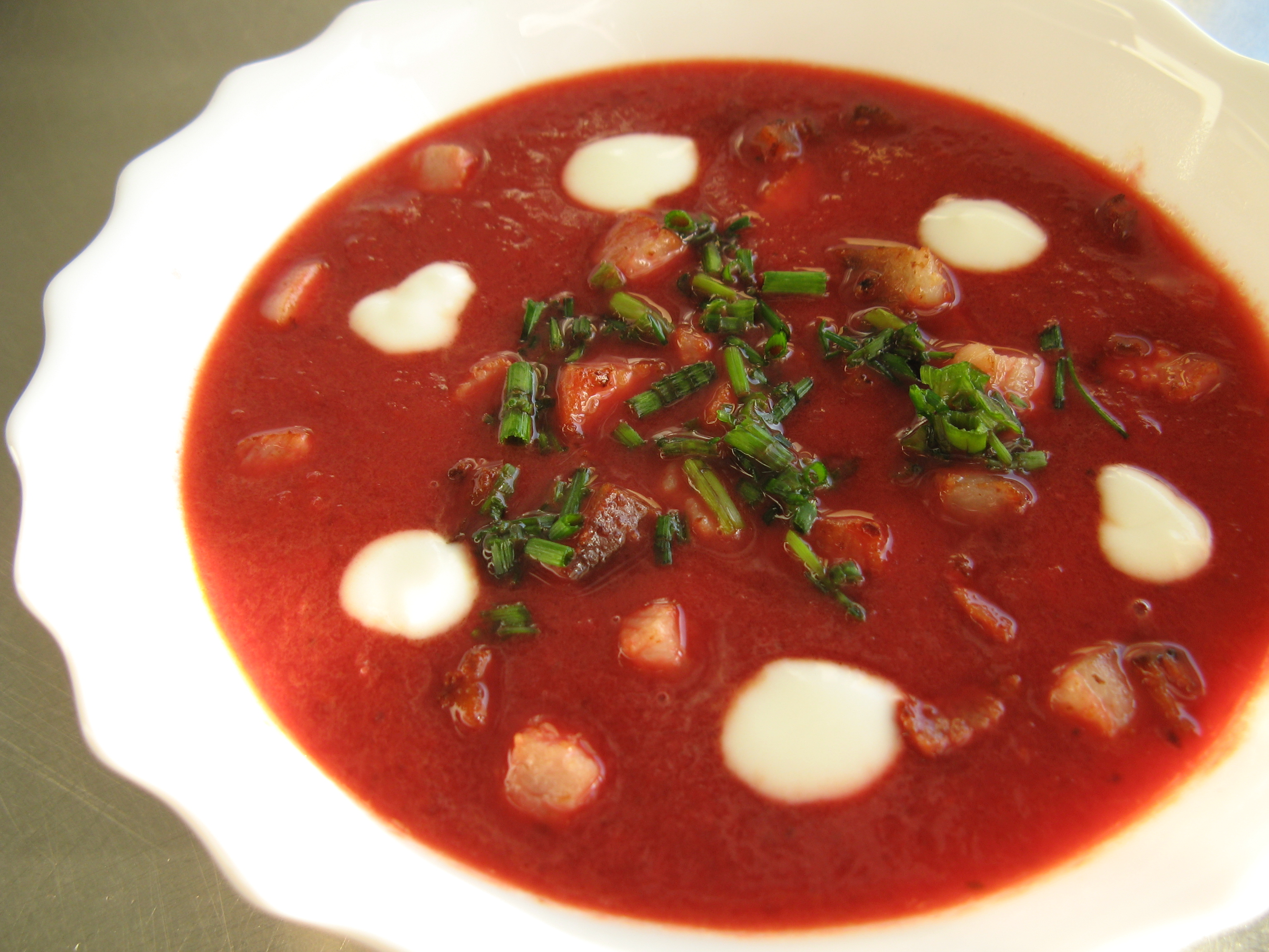 Valmistatud Tallinna Teeninduskooli kokakursuse raames. Sügissemester 2007 (september - detsember)